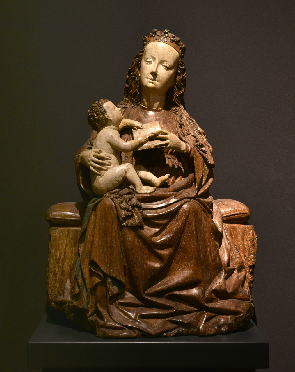 Trůnící Madona s Ježíškem z Chebu (pol. 15. stol.), expozice Galerie výtvarného umění v Chebu